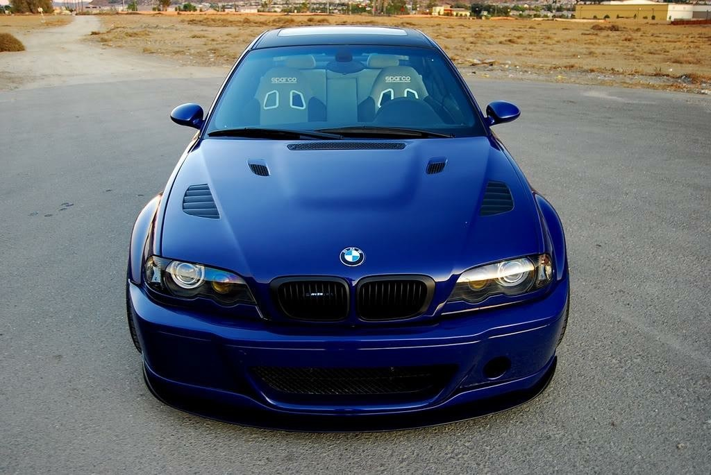 BMW CSL CON BAQUETS RECARO